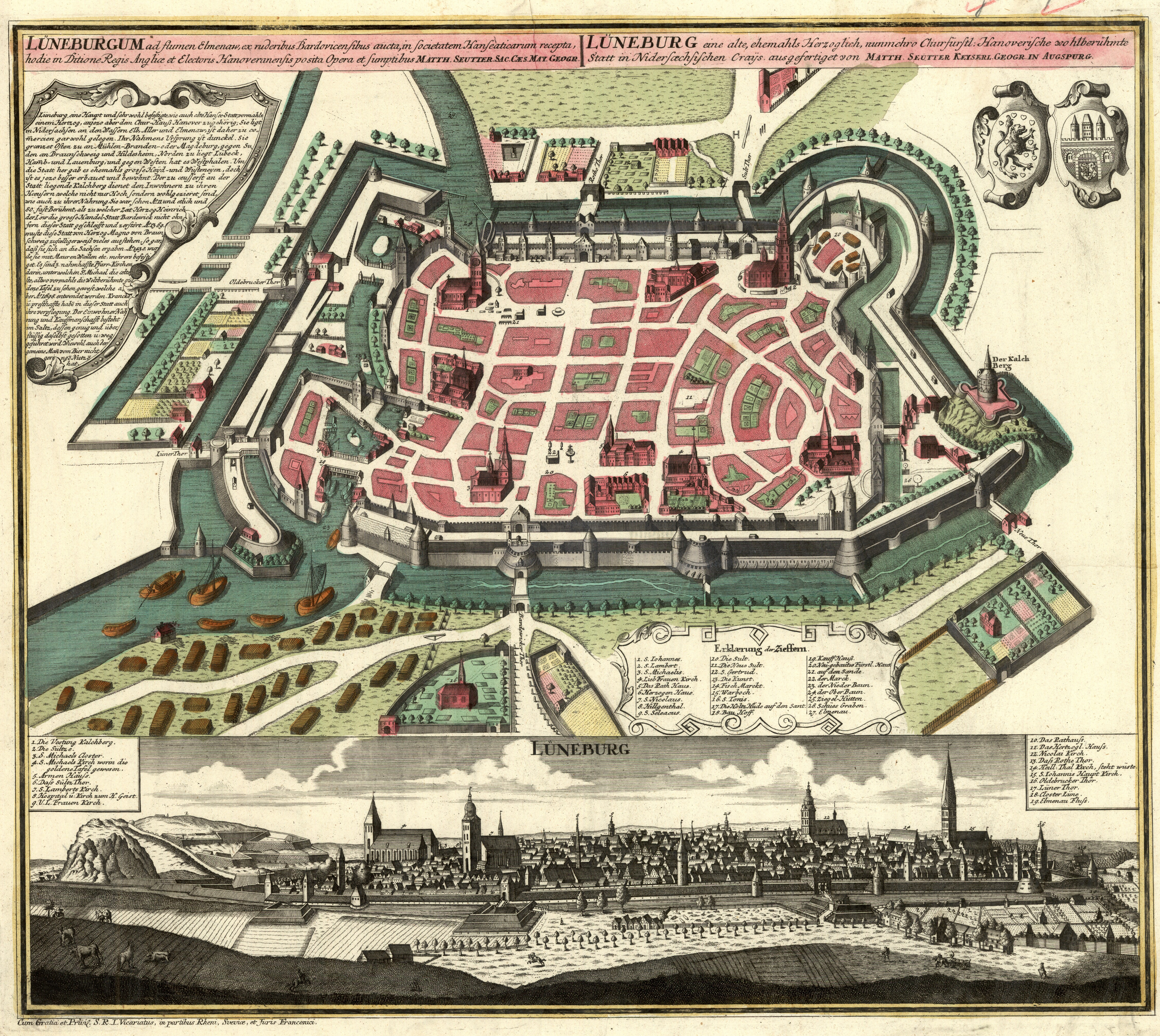 Lüneburgum ad flumen Elmenaw ex ruderibus Bardovicensibus aucta, in societatem Honseaticarum recepta, hodie in Ditione Regis Angliae et Electoris Hanoveranensis posita = Lüneburg eine alte, ehemahls Herzoglich, nunmehro Churfürstl: Honoverische wohlberühmte Statt in Nidersaechsischen Crays / Opera et sumptibus Matth. Seutter Sac. Caes. May. Geogr. ; ausgefertiget Matth. Seutter Keiserl. Geogr. in Augspurg